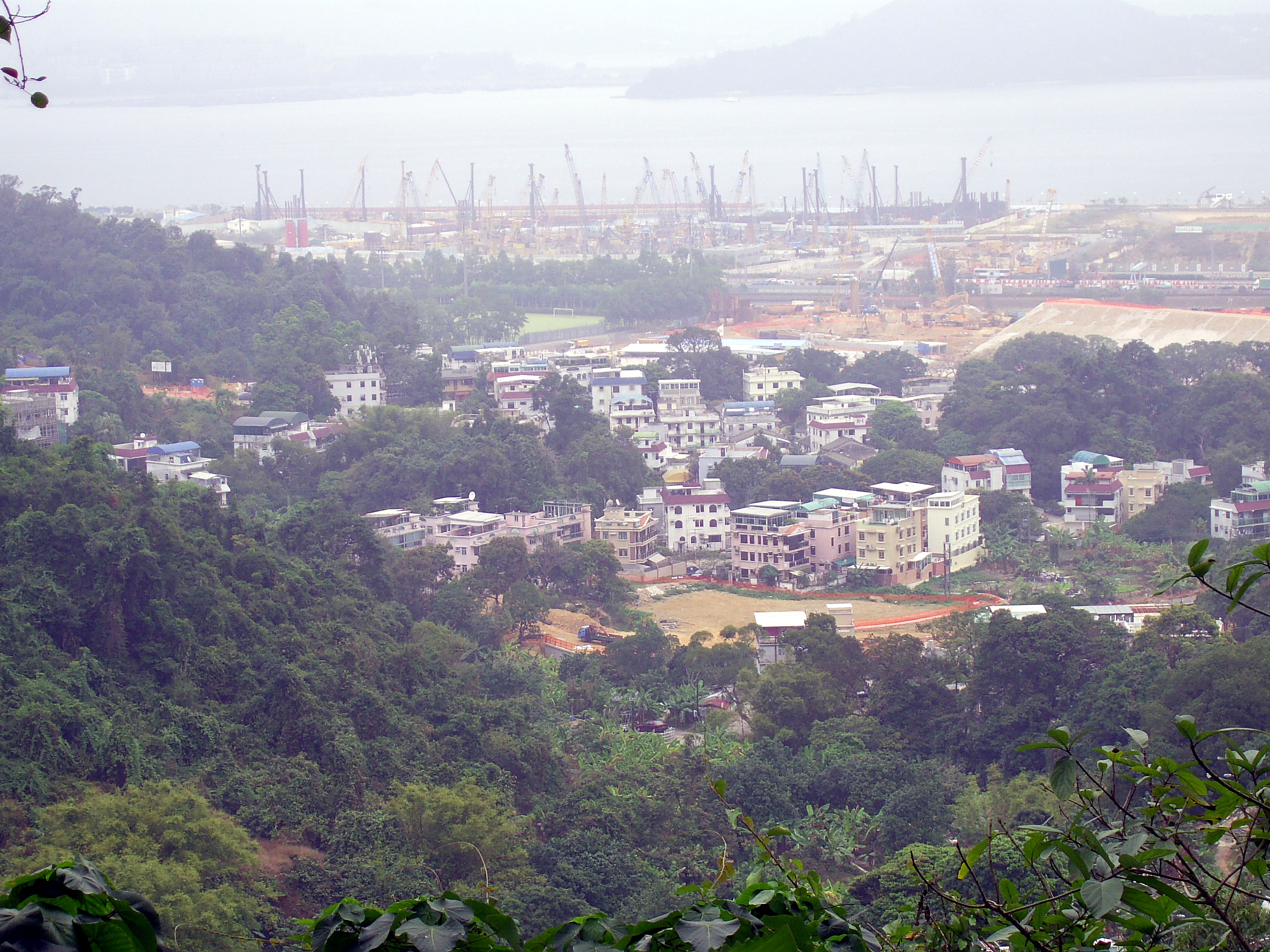 中文（香港）: 樟樹灘村